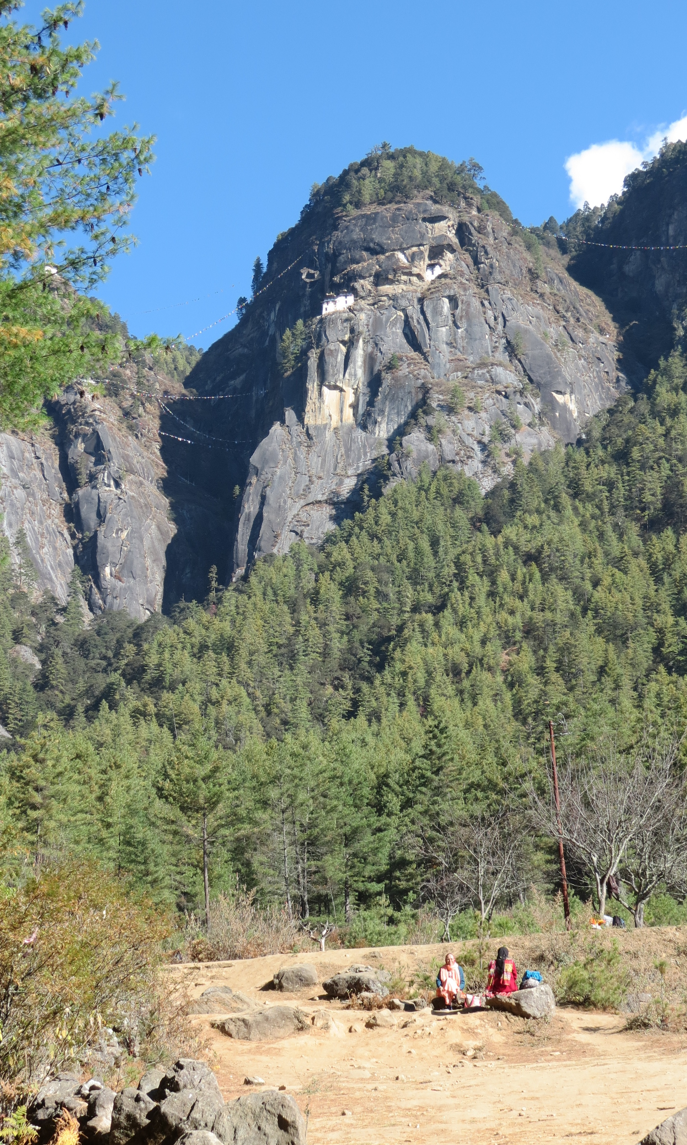 Paro 2-5